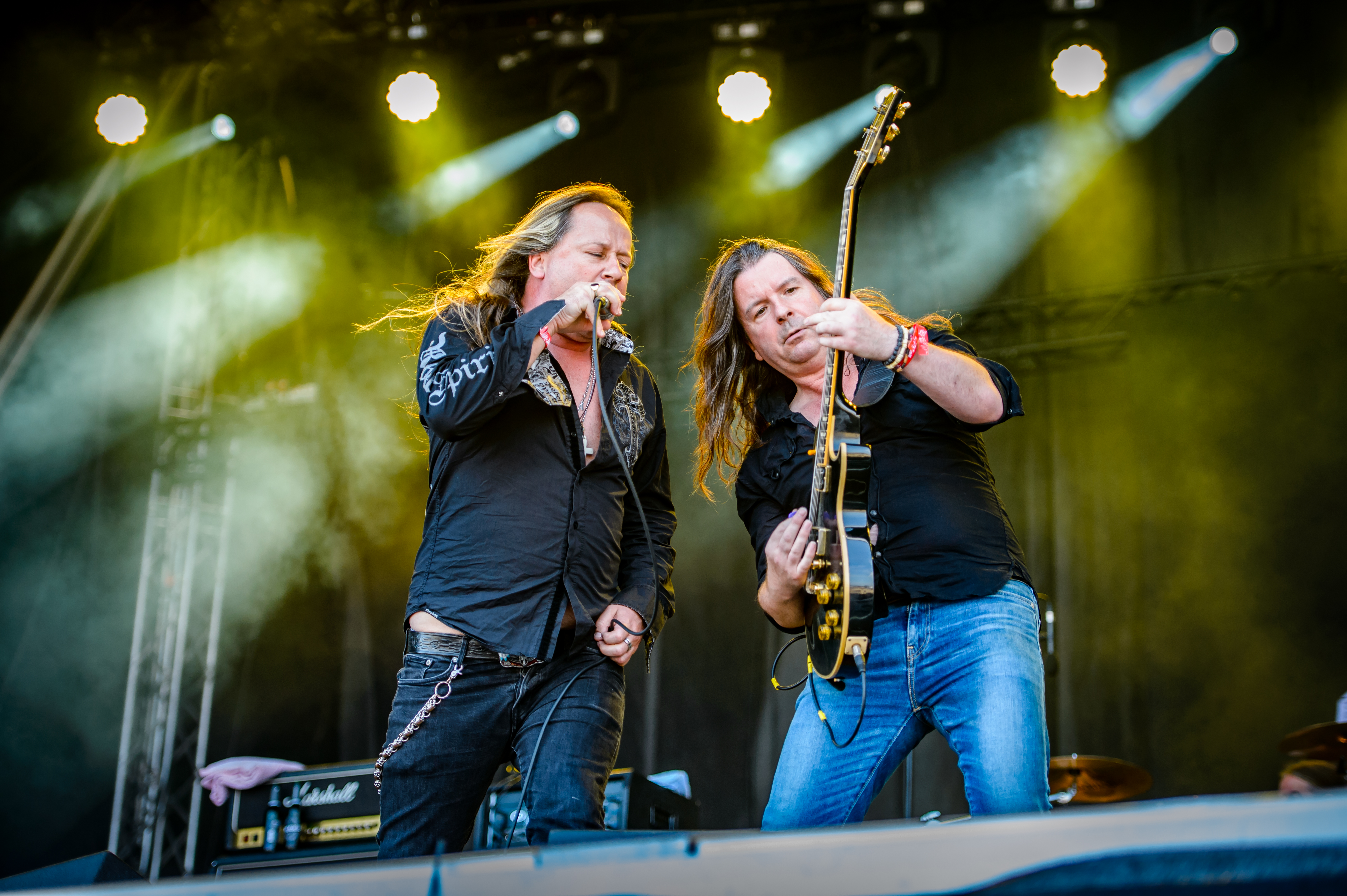 'RockHarz Open Air 2017; Ballenstedt': 'Tank'